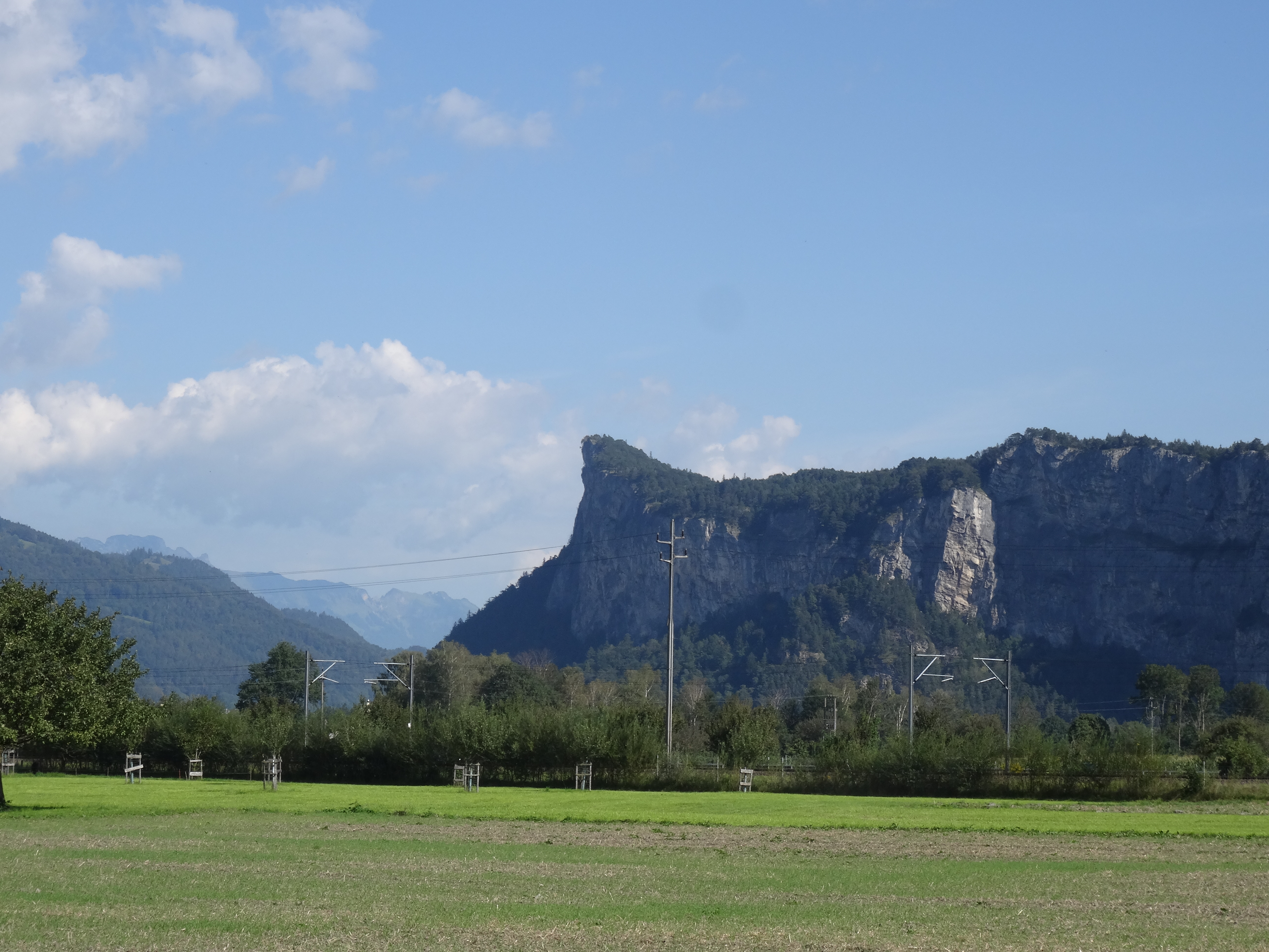 Ellhorn